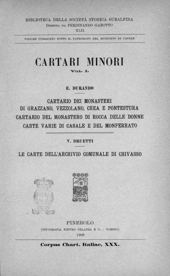 Frontespizio